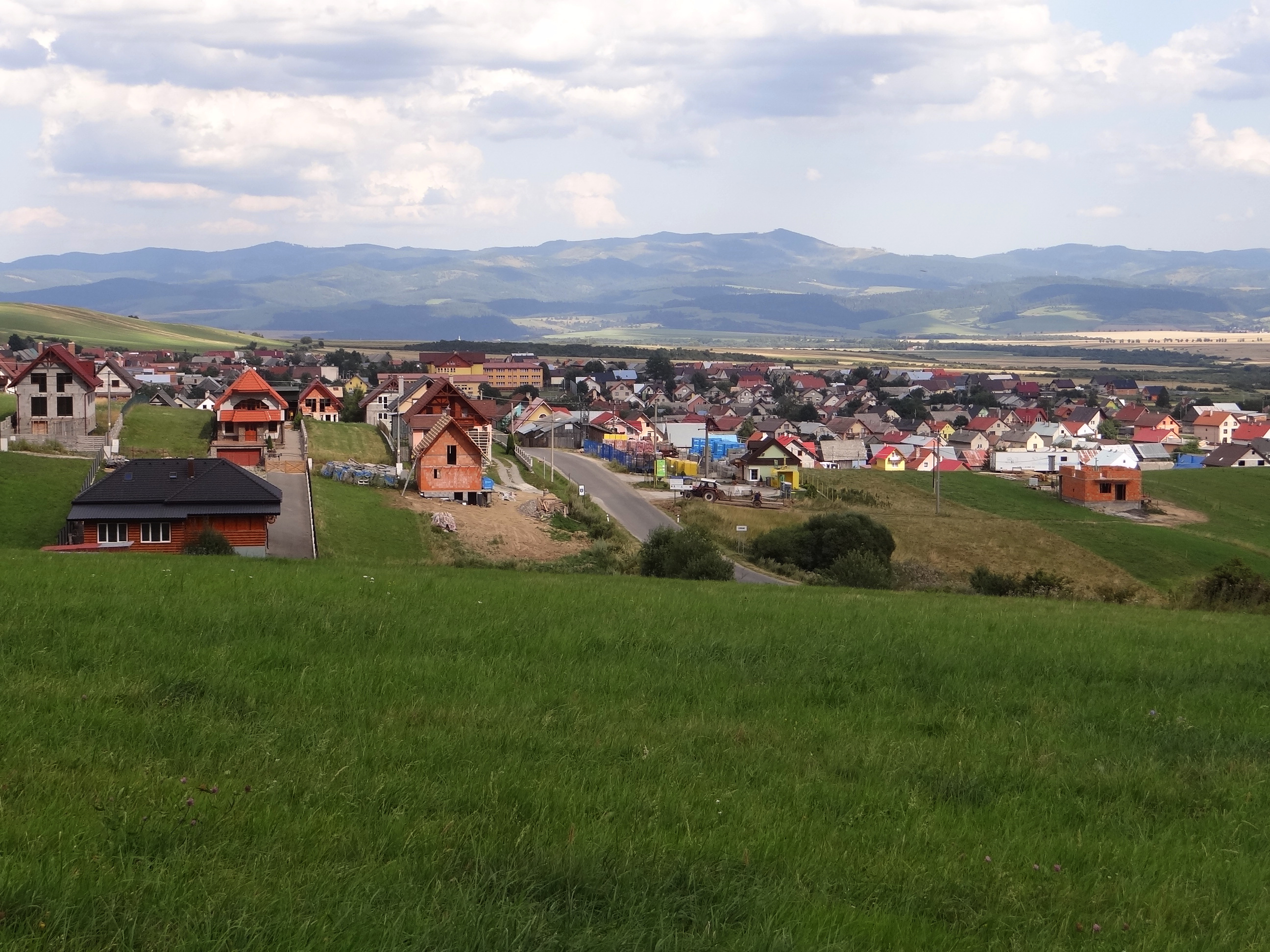 Lendak, widok ogólny